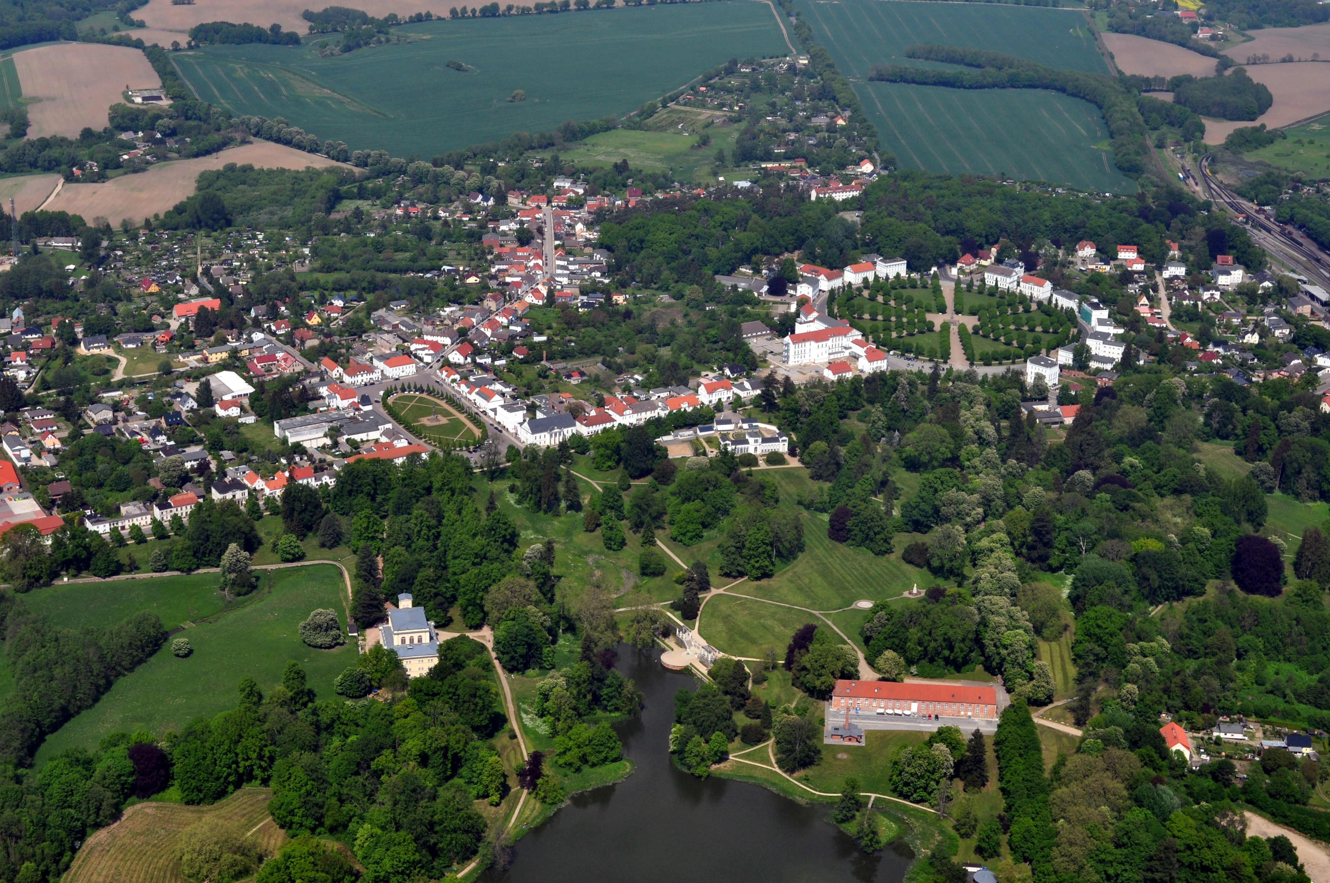 Die Bilder wurden von mir während eines einstündigen Rundflugs ab Flugplatz Güttin am 21. Mai 2011 aufgenommen. Die Bildbeschreibung steht im Dateinamen. Aufgenommen mit einer Nikon D5000 durch das Seitenfenster des Flugzeugs.